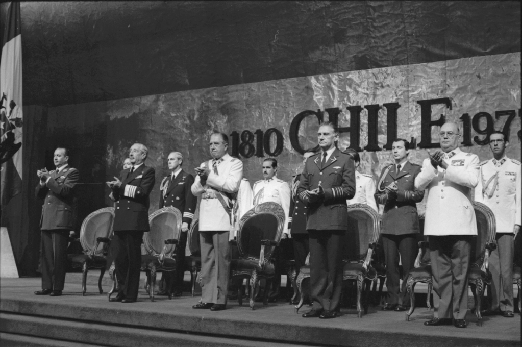 Junta militar y Augusto Pinochet Ugarte, en el edificio Diego Portales, para una nueva celebración de la Constitución. En primera fila, de izquierda a derecha: César Mendoza, José Toribio Merino, Augusto Pinochet, Fernando Matthei, y Humberto Gordon.